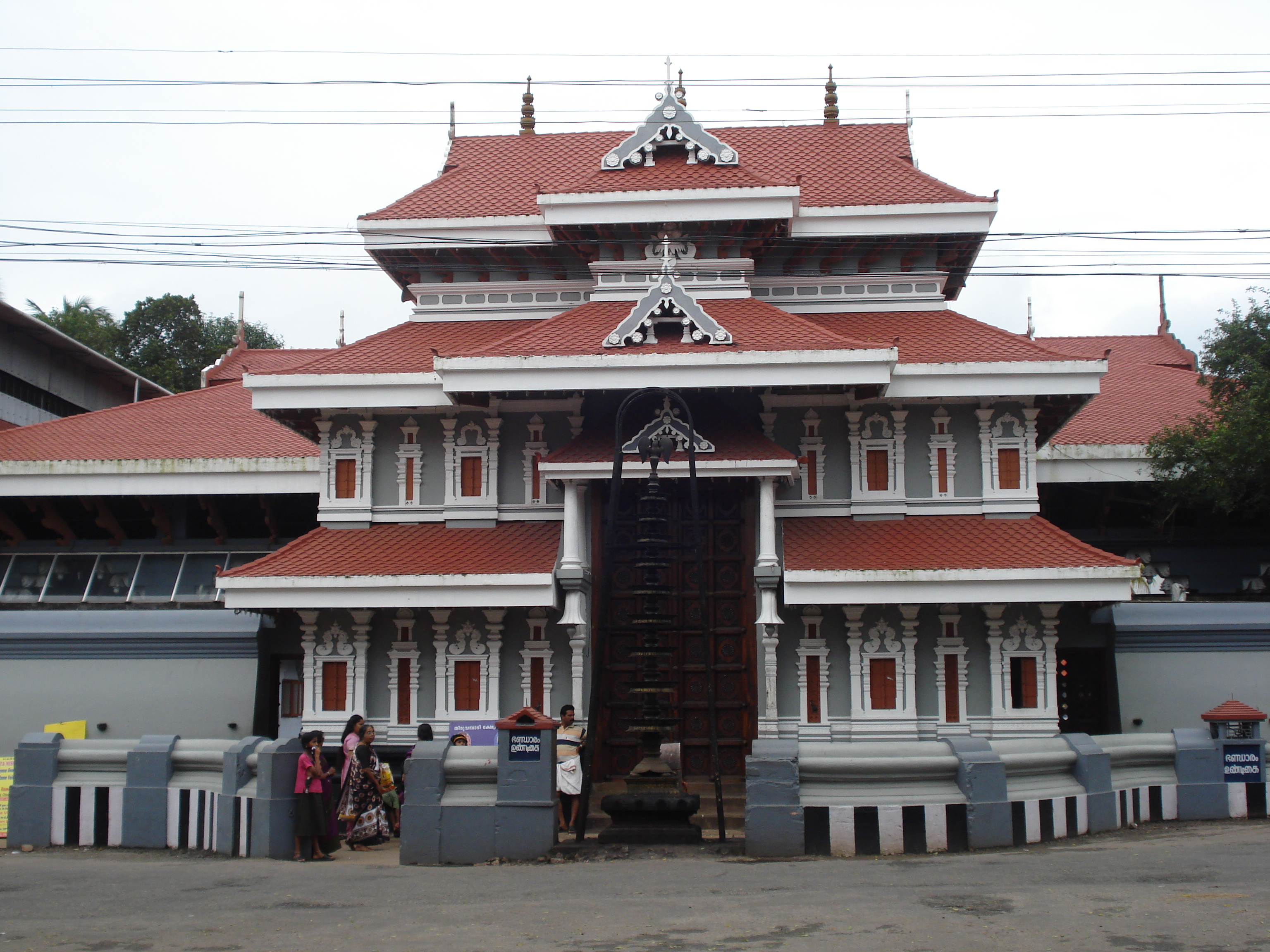 Thiruvambadi Temple, Thrissur